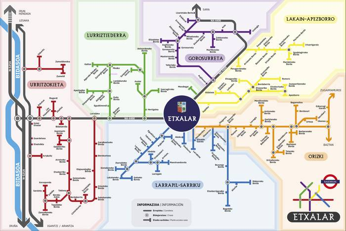 Etxalarko baserrietara heltzeko bidea erraz aurkitzeko metrobaserri mapa.